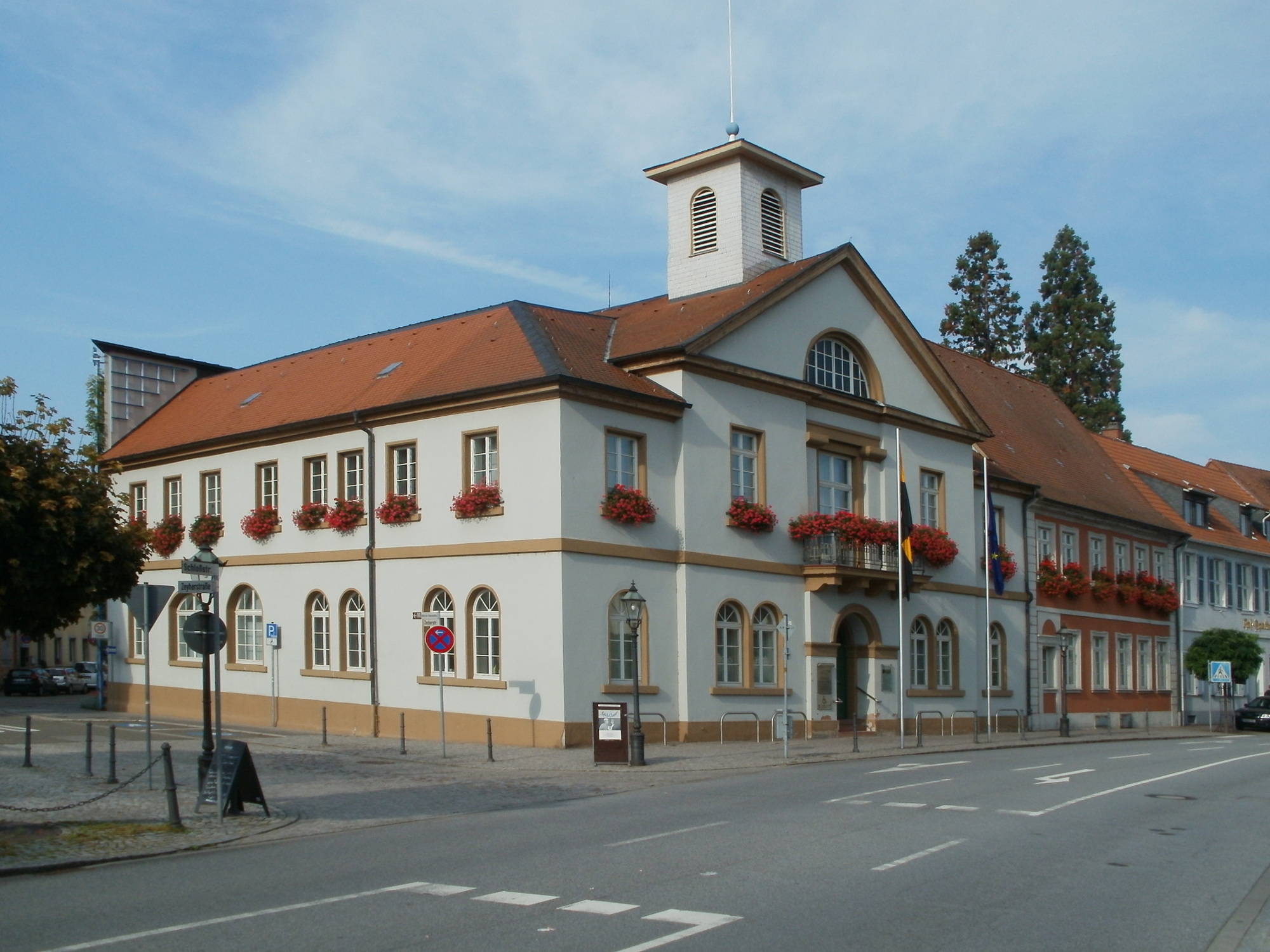 Rathaus Schwetzingen